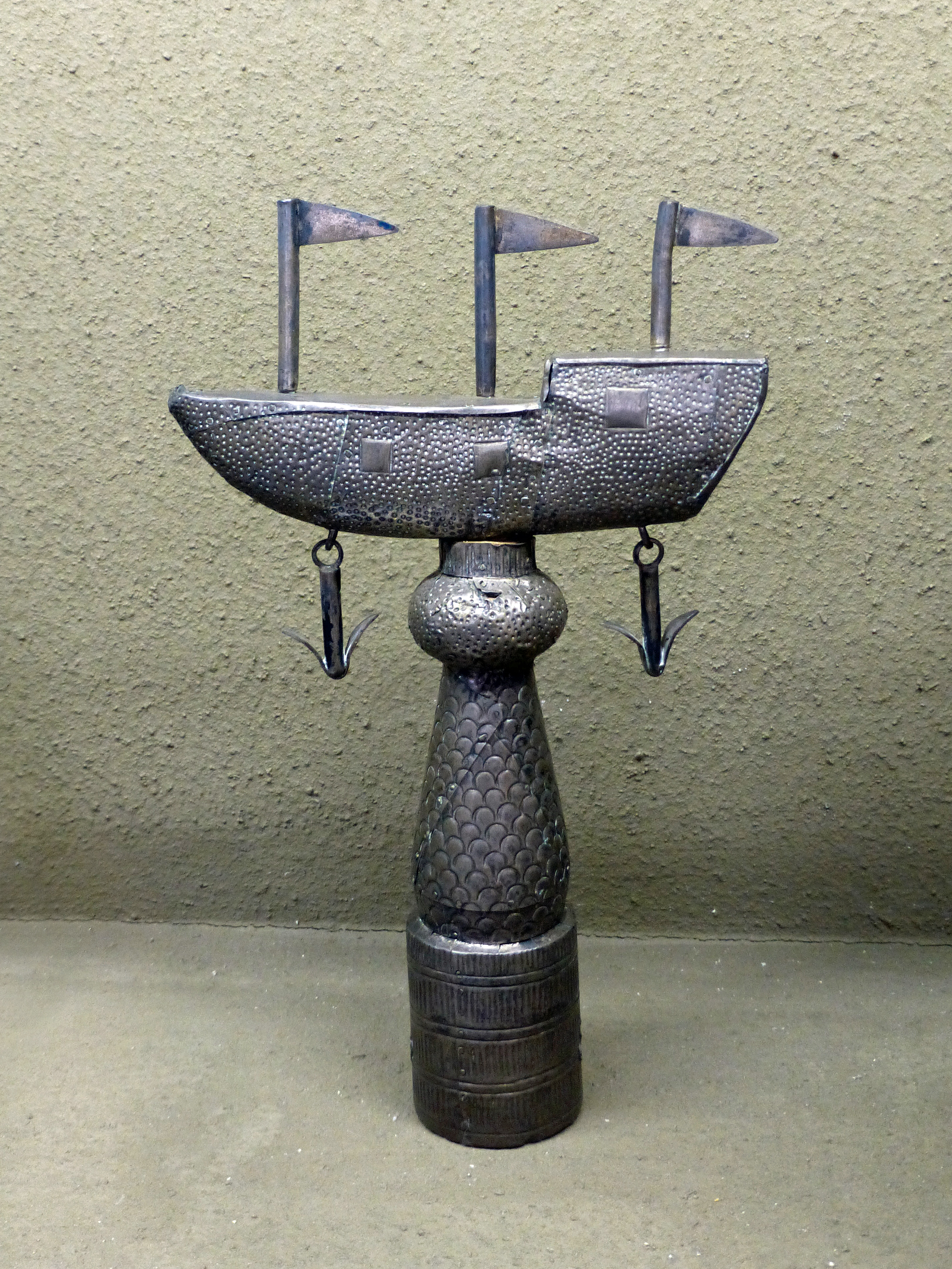 Emblème du roi Agadja. Fon, Bénin, fin du XVIIIe s. Bois et argent, 23 cm. Musée africain de Lyon